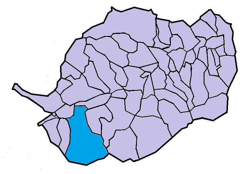 Fontpedrosa en el Conflent, a partir del mapa municipal del Conflent de lliure disposició adaptat al Nomenclàtor toponímic aprovat el 2007